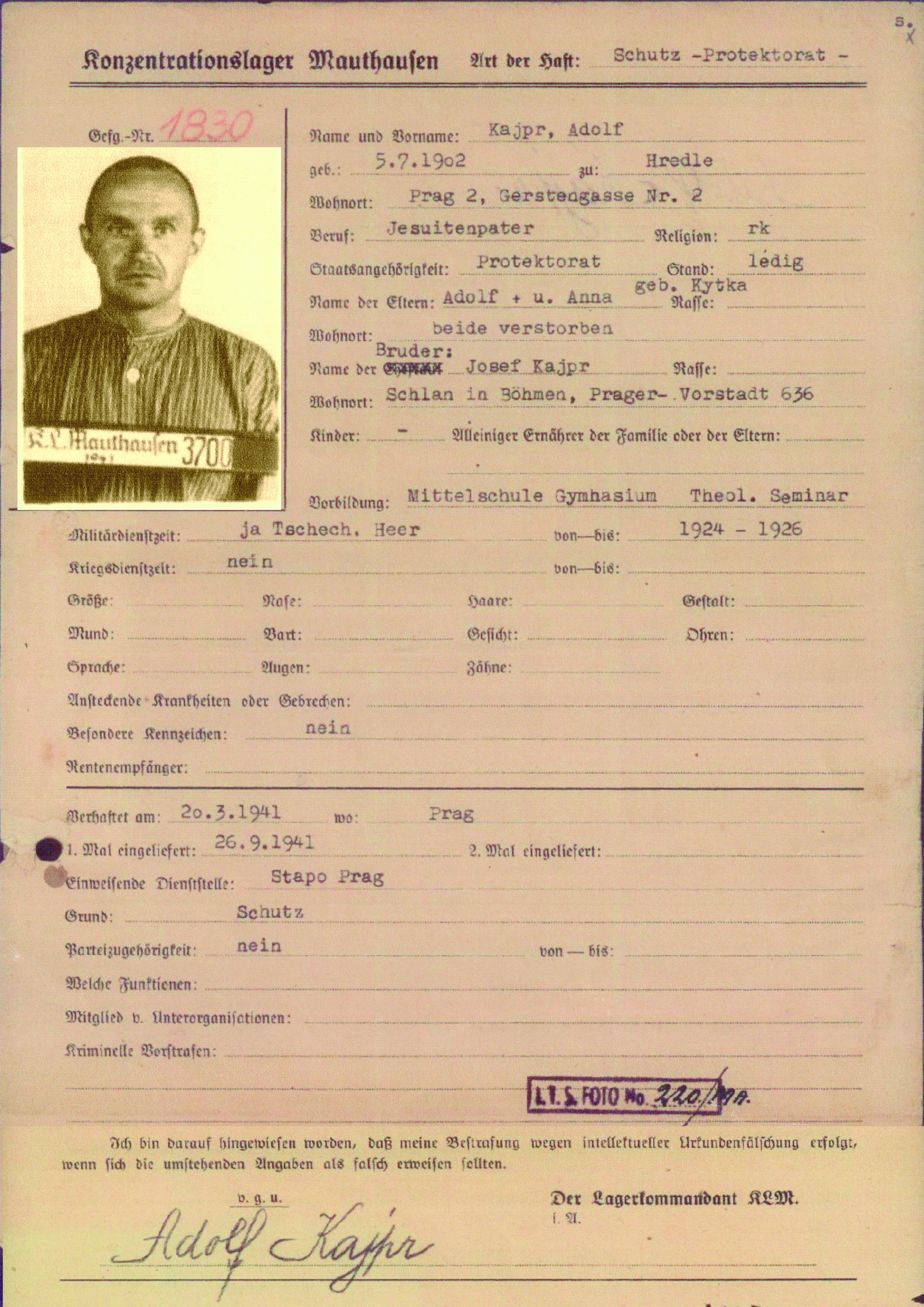 Adolf Kajpr Osobní záznam Mauthausen